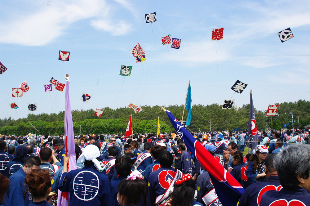 浜松まつり、Hamamatsu Giant Kite Festival in Hamamatsu Matsuri